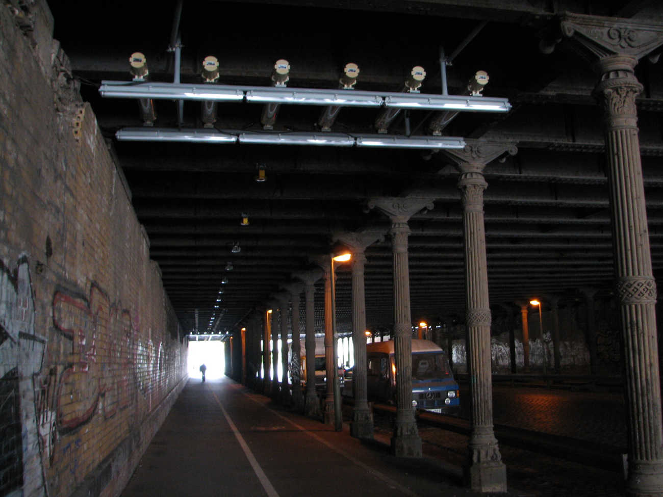 Nicht mehr aktive Lichtinstallation im Gleimtunnel